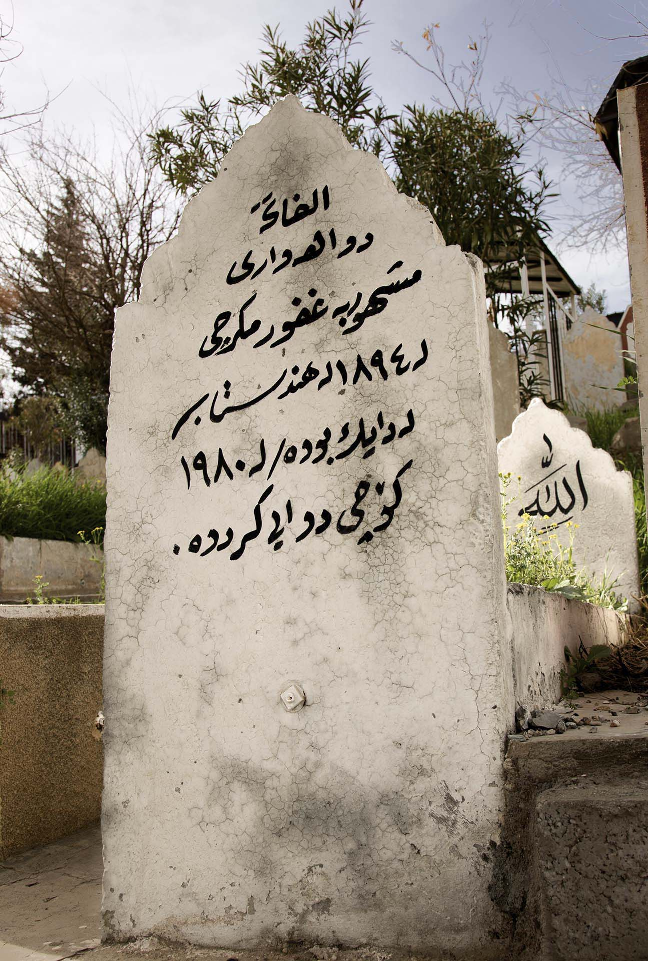 کوردی: گۆڕی گۆکول چاند مکورجی لە گردی سەیوان - سلێمانی